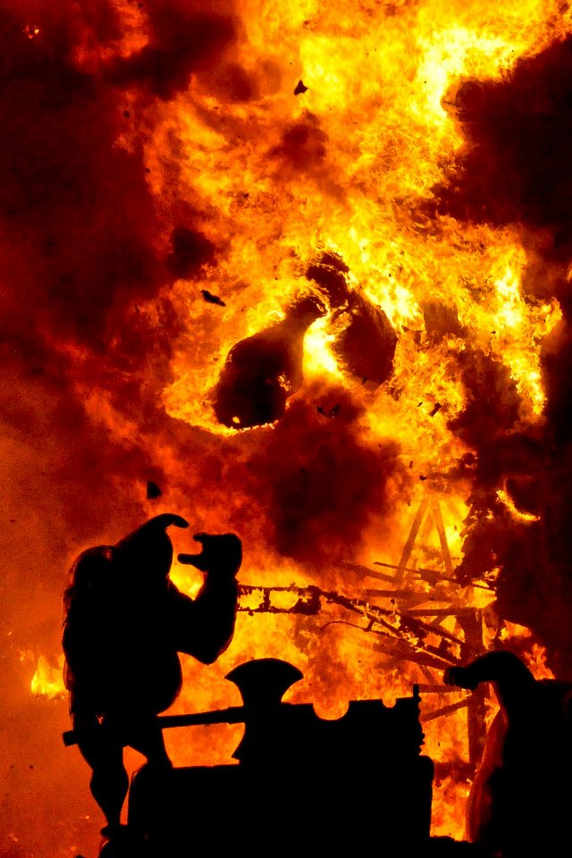 Falla de Elda, ardiendo